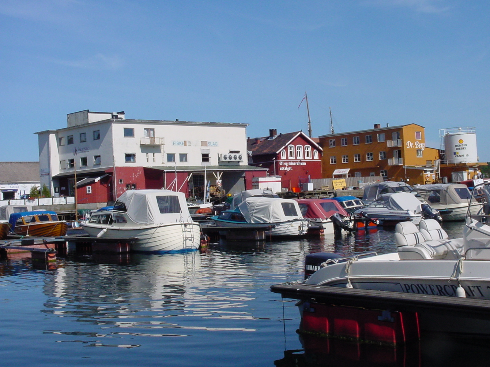 Hafen von Grimstad Sonstiges: ...